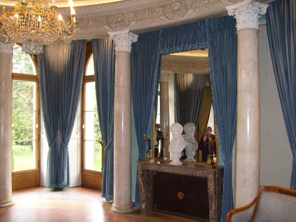 Salon bleu du Palais Eynard à Genève (Suisse)